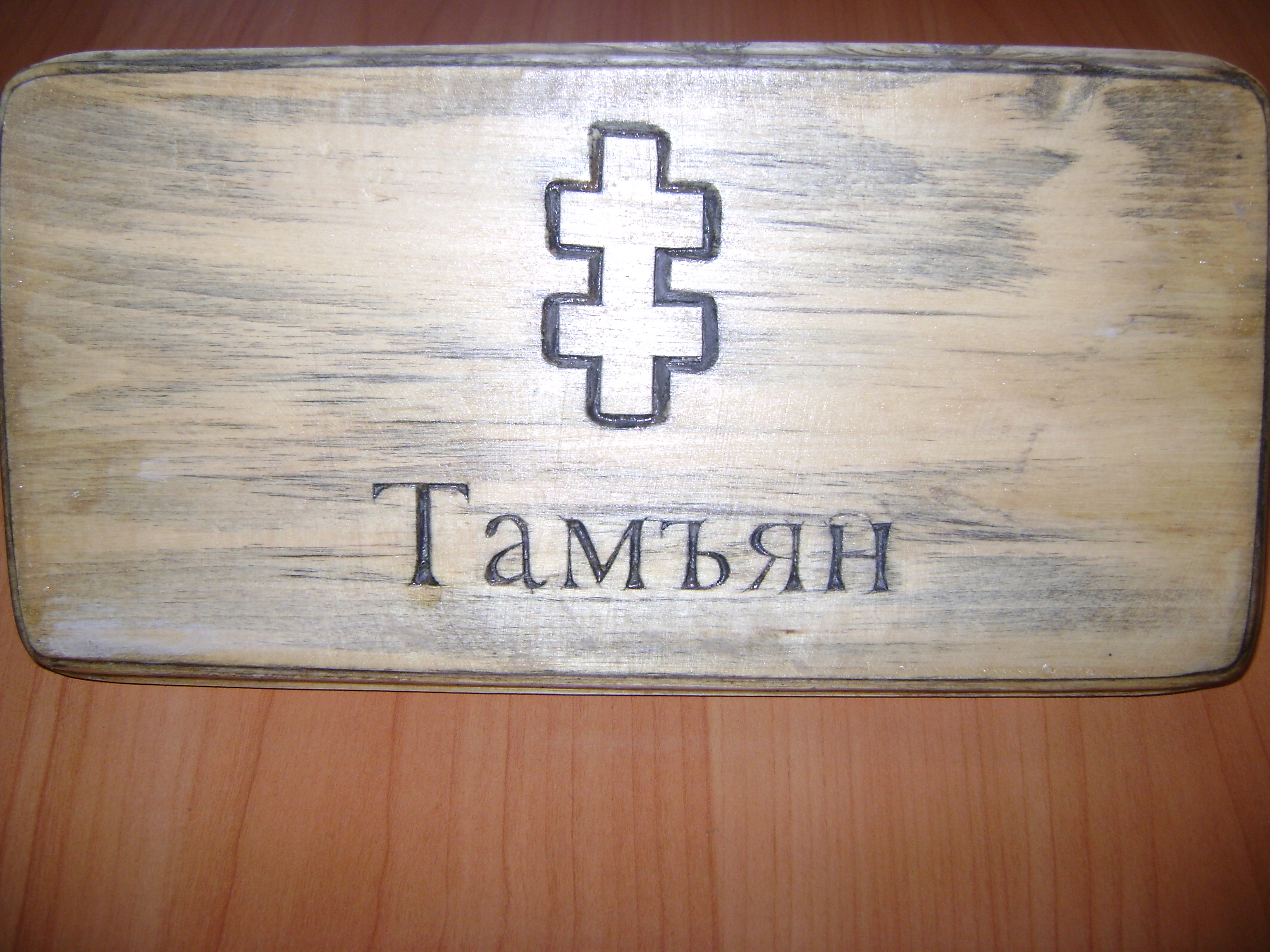 Тамга башкирского племени Тамьян